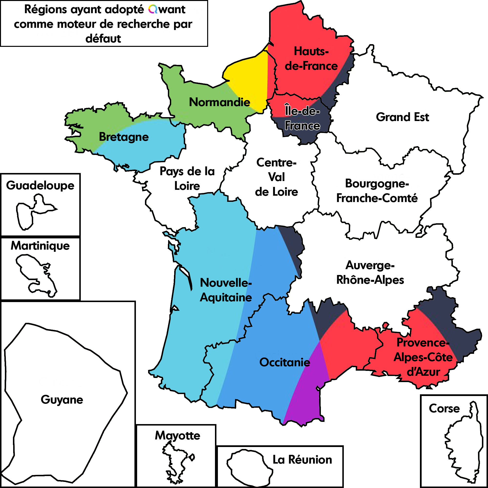 Régions qui ont choisi Qwant comme moteur de recherche par défaut.